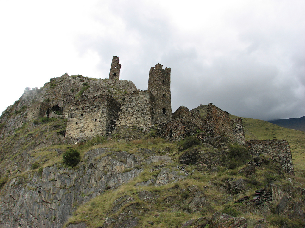 MUTSO / KHEVSURETI